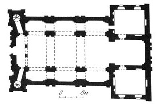 костел Вел. Межиріччя Рівненська обл.